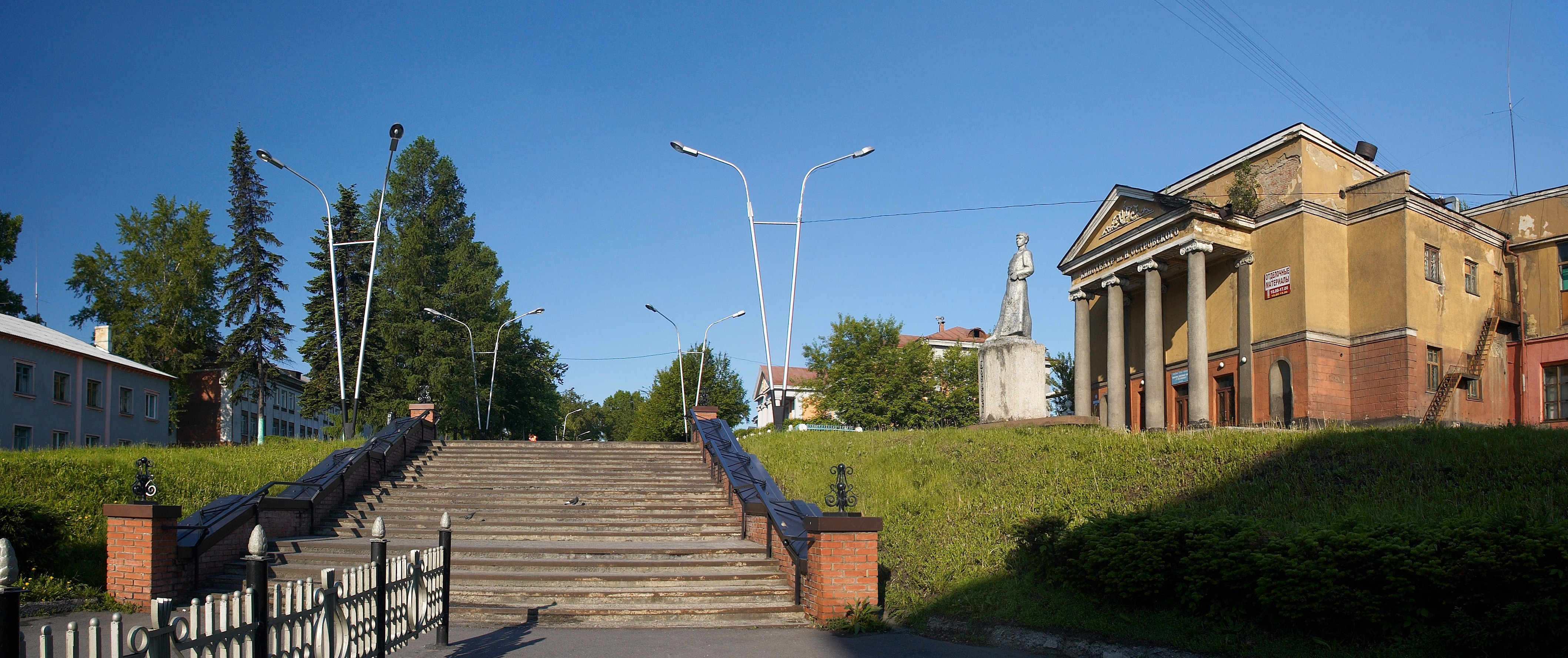 Ул. Артёма, лестница от драматического театра с видом на кинотеатр им. Островского, 7 июня 2009 г., панорама из 2-х кадров.